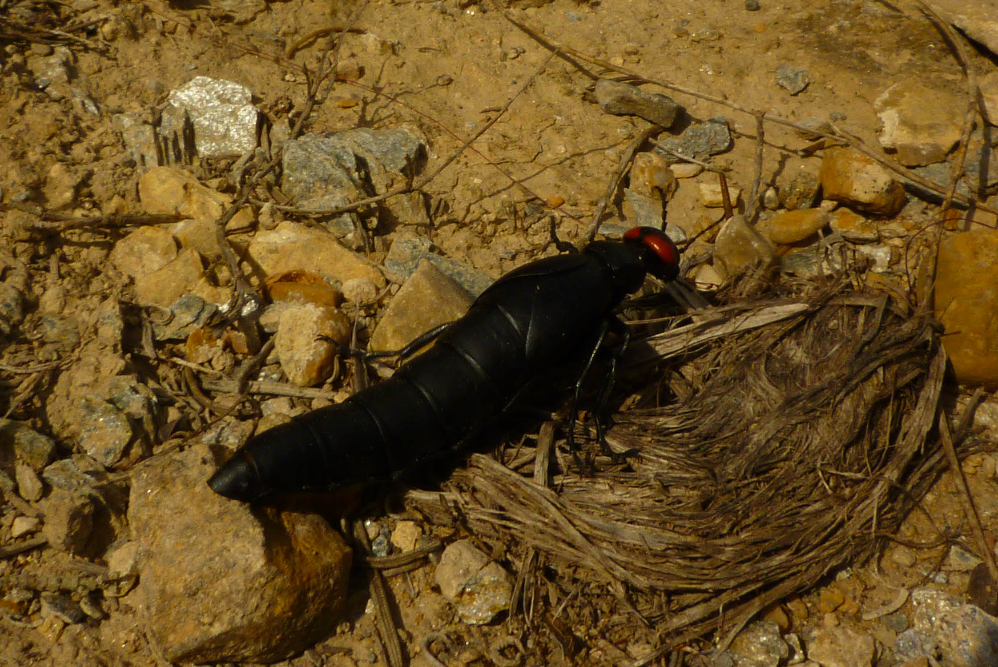 Aceitera real (Berberomeloe insignis), endemismo del sureste ibérico, en el parque natural de la sierra de la Muela, Cartagena, España.